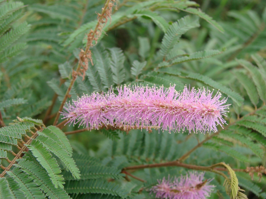 Mimosa verrucosa Benth. - FABACEAE - BR 242 - Cristópolis - Bahia - Brasil.